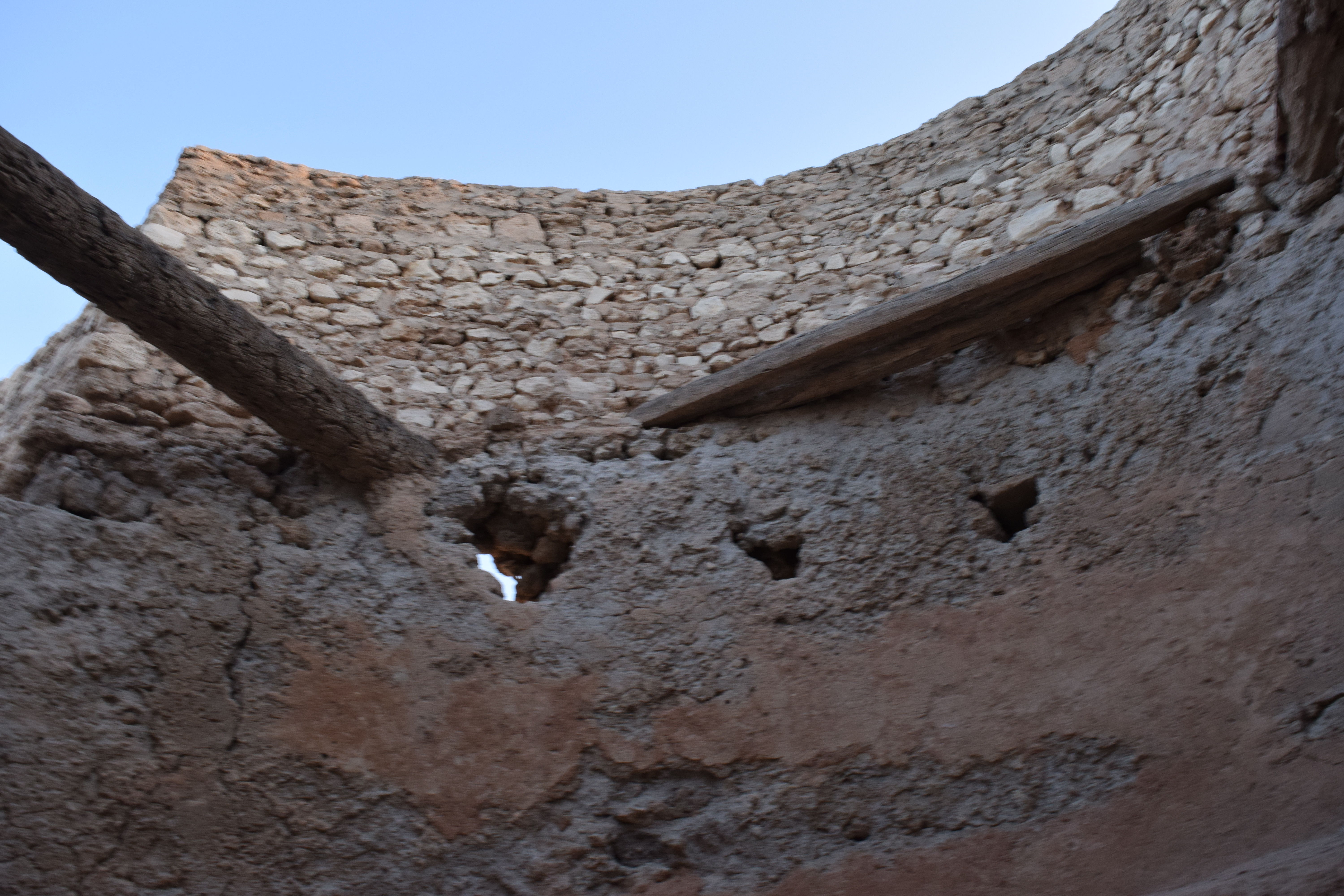 صورة مقربة لإحدى أبراج قلعة تاروت